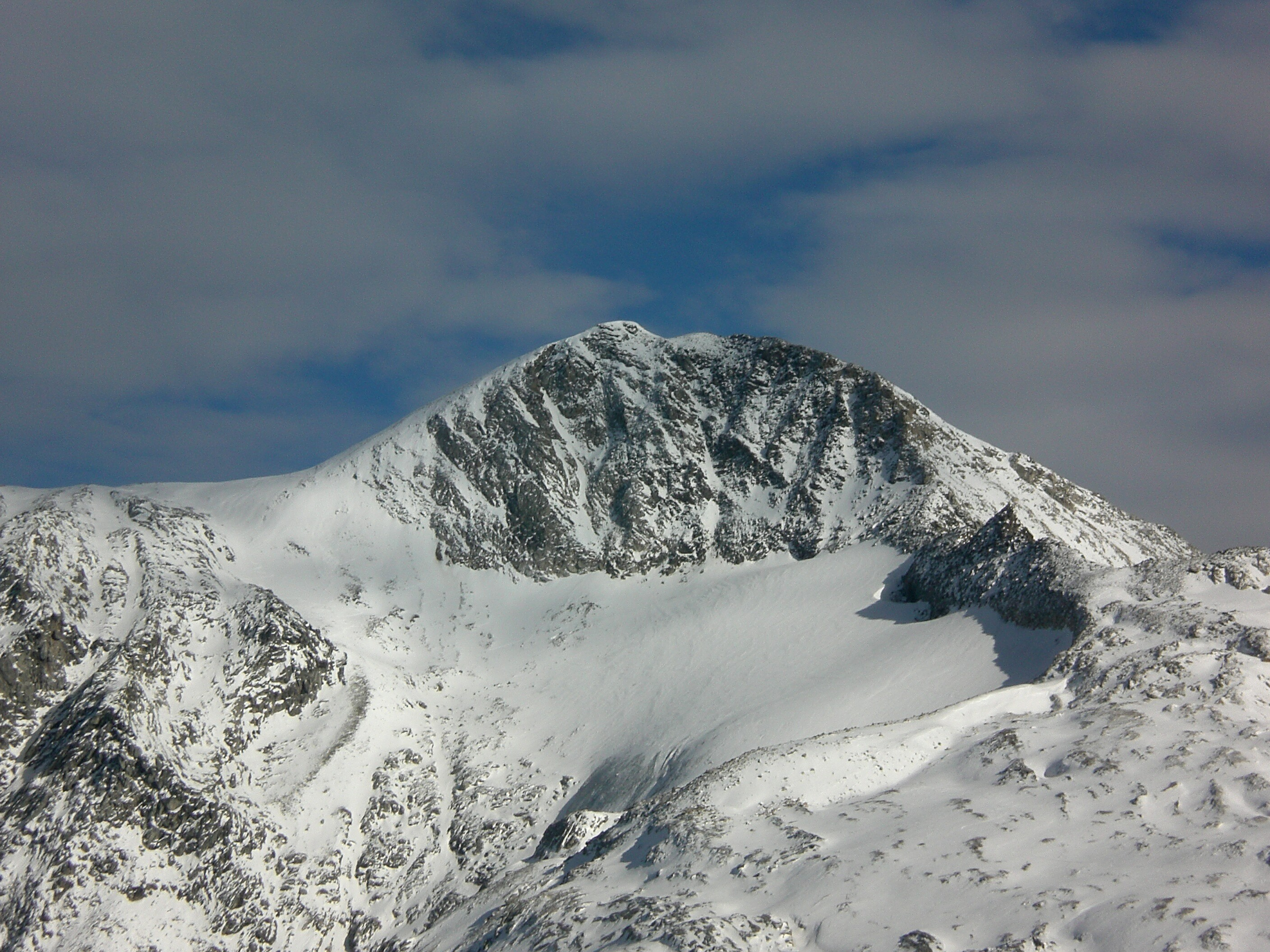 Hoher Riffler, 3231m, im Osten des Tuxer Hauptkamms, davor das Schwarzbrunner Kees. Ansicht von Westen.